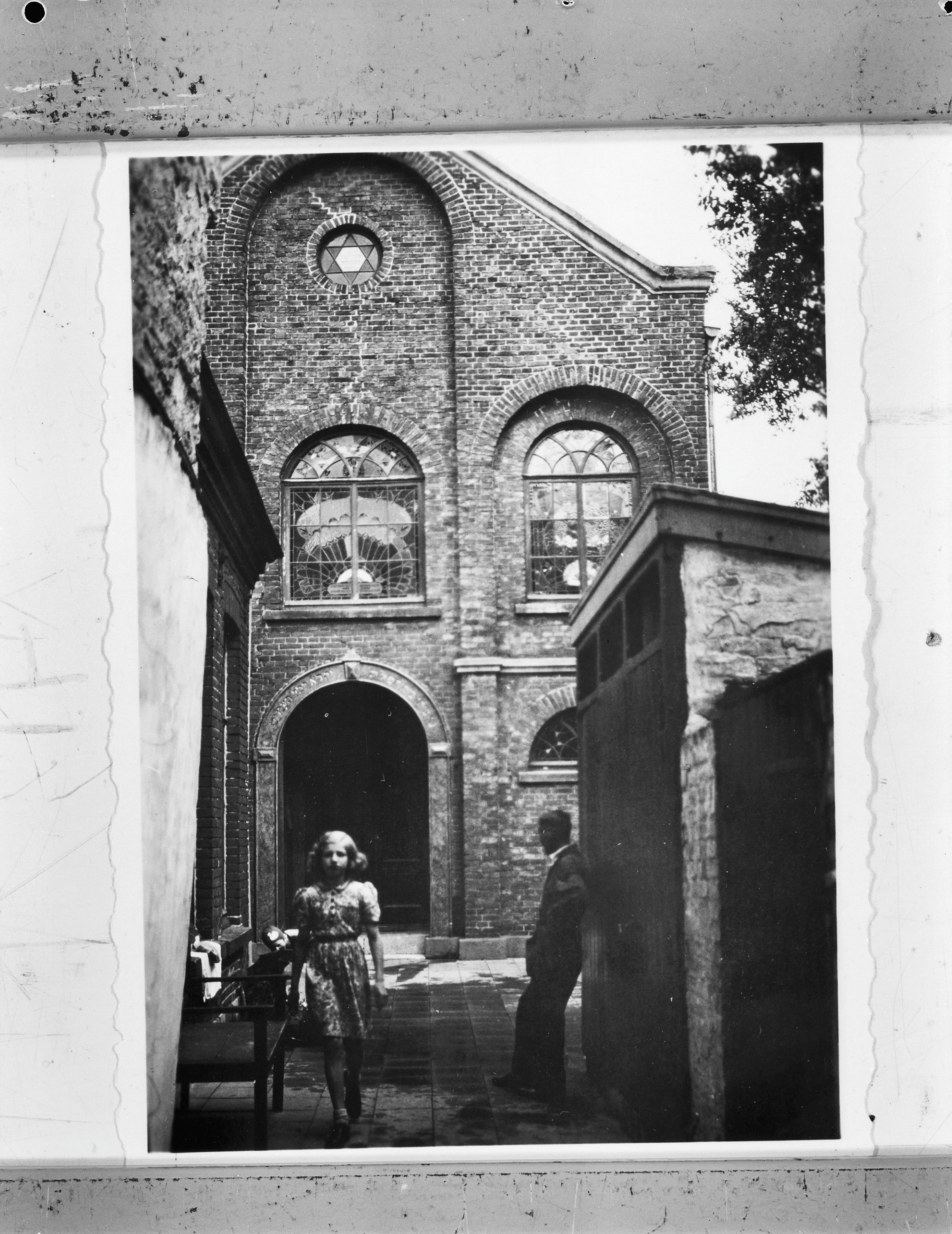 Voormalige Synagoge: exterieur - Venlo, Maasschriksel 20 - Synagoge - Anno 1865 - In 1965 afgebroken